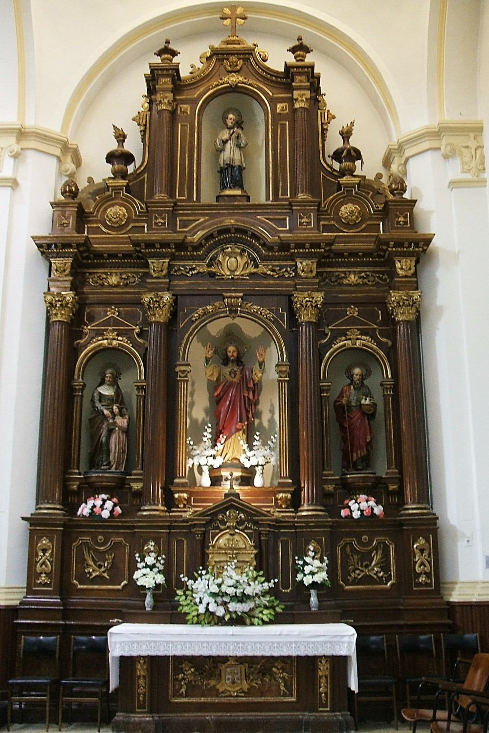 Retablo del Sagrado Corazón de Jesús, Iglesia del Carmen (PP Carmelitas Descalzos), en Vitoria-Gasteiz, País Vasco, España